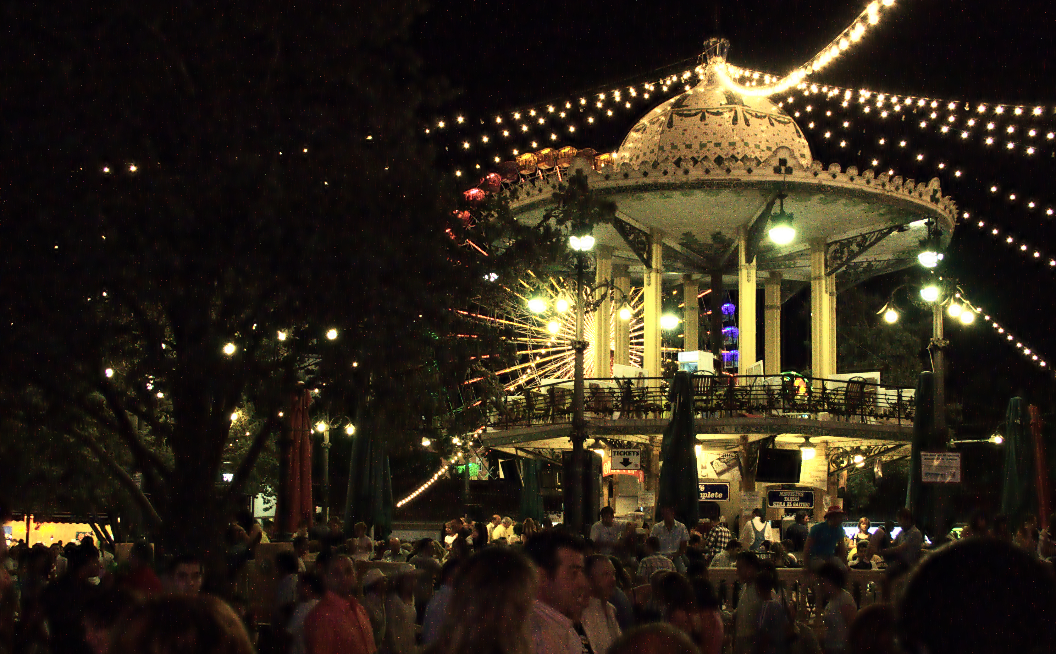 Feria de Albacete 2007_04